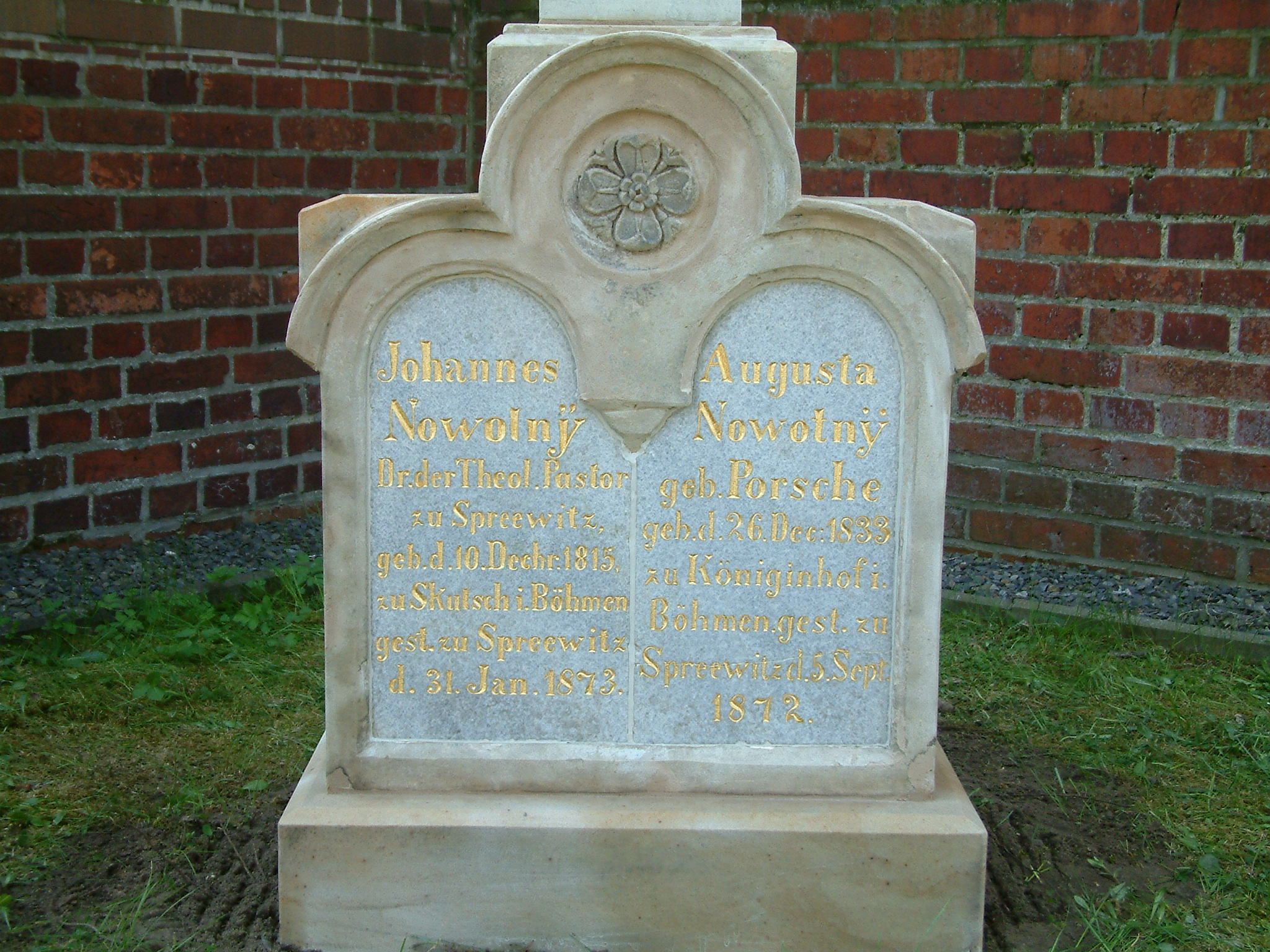 Grabstein des Pfarrerehepaares Johannes und Augustina (Augusta) Nowotny (geb. Porsche) in D-02979 Spreewitz